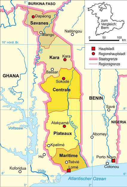 Politische Karte Togos